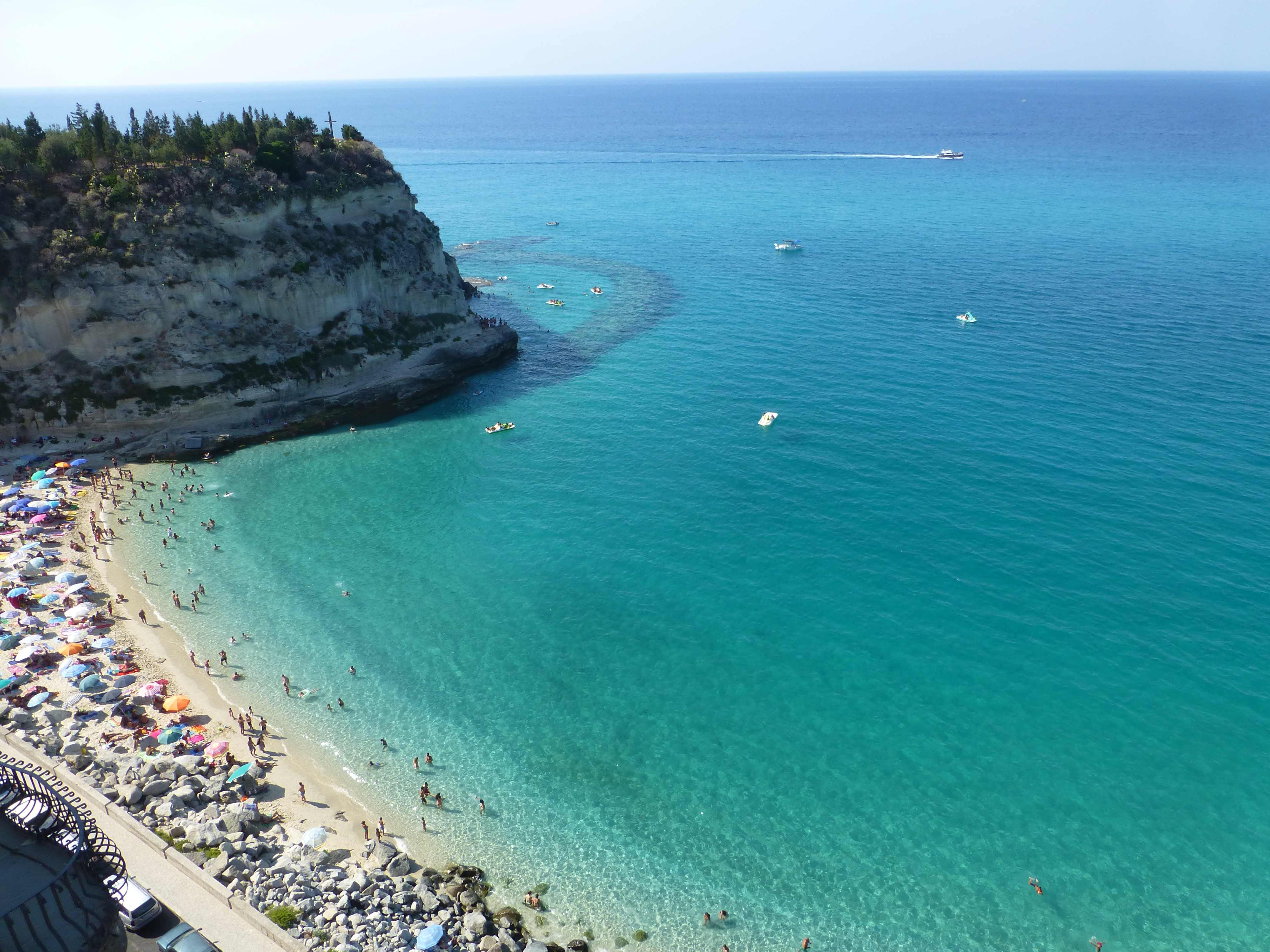 Promontorio di Tropea da belvedere con ringhiera 2